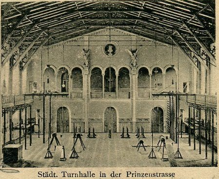 Zentralturnhalle Berlin Prinzenstraße 56, Innenansicht auf alter Postkarte von 1903